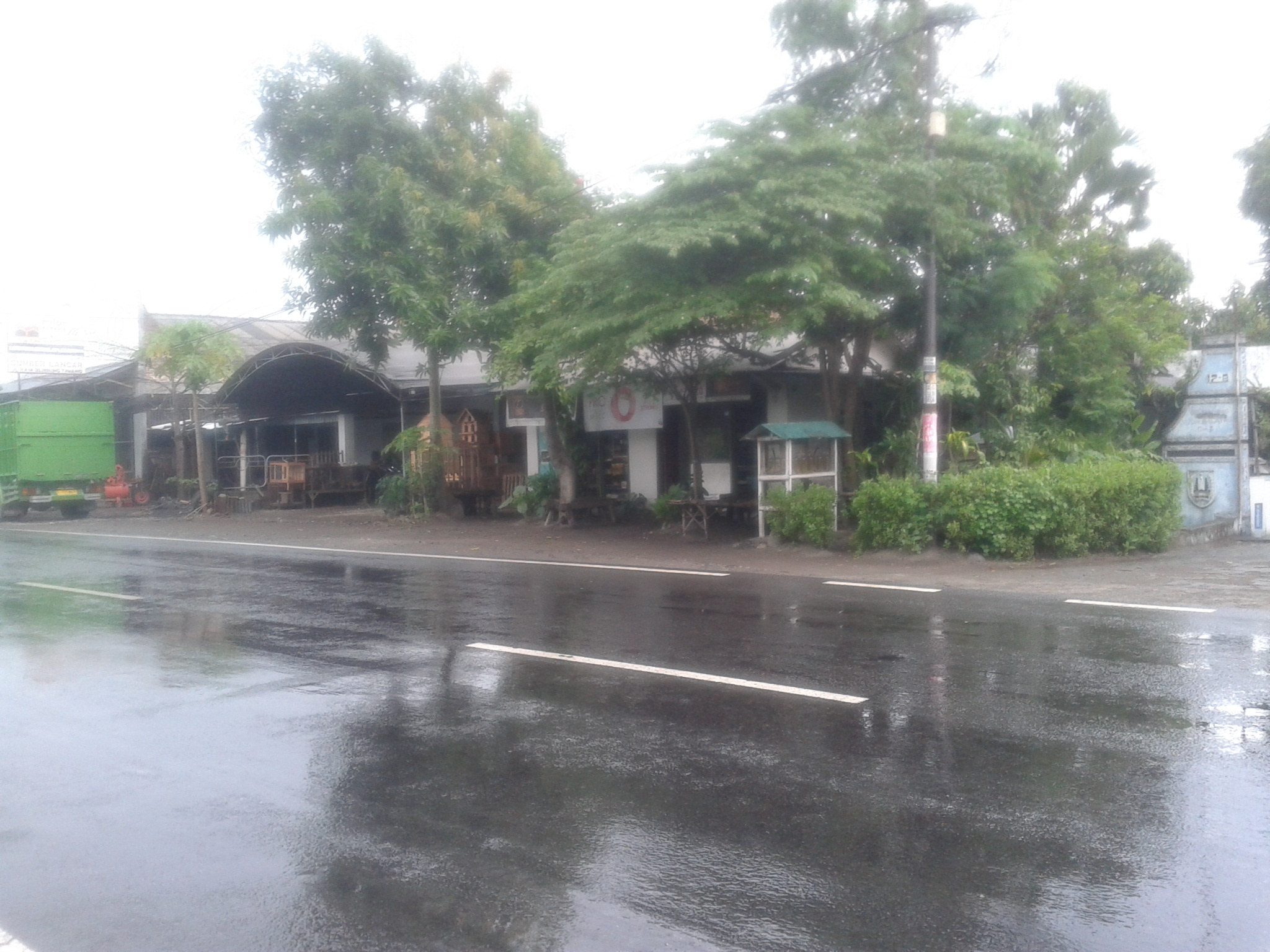 EKS STASIUN BLIMBING